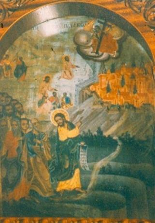 Μόσχος, Ο Κύριος πορευόμενος προς το εκούσιον πάθος, 19ος αι., Άγιοι Απόστολοι, Δράμα